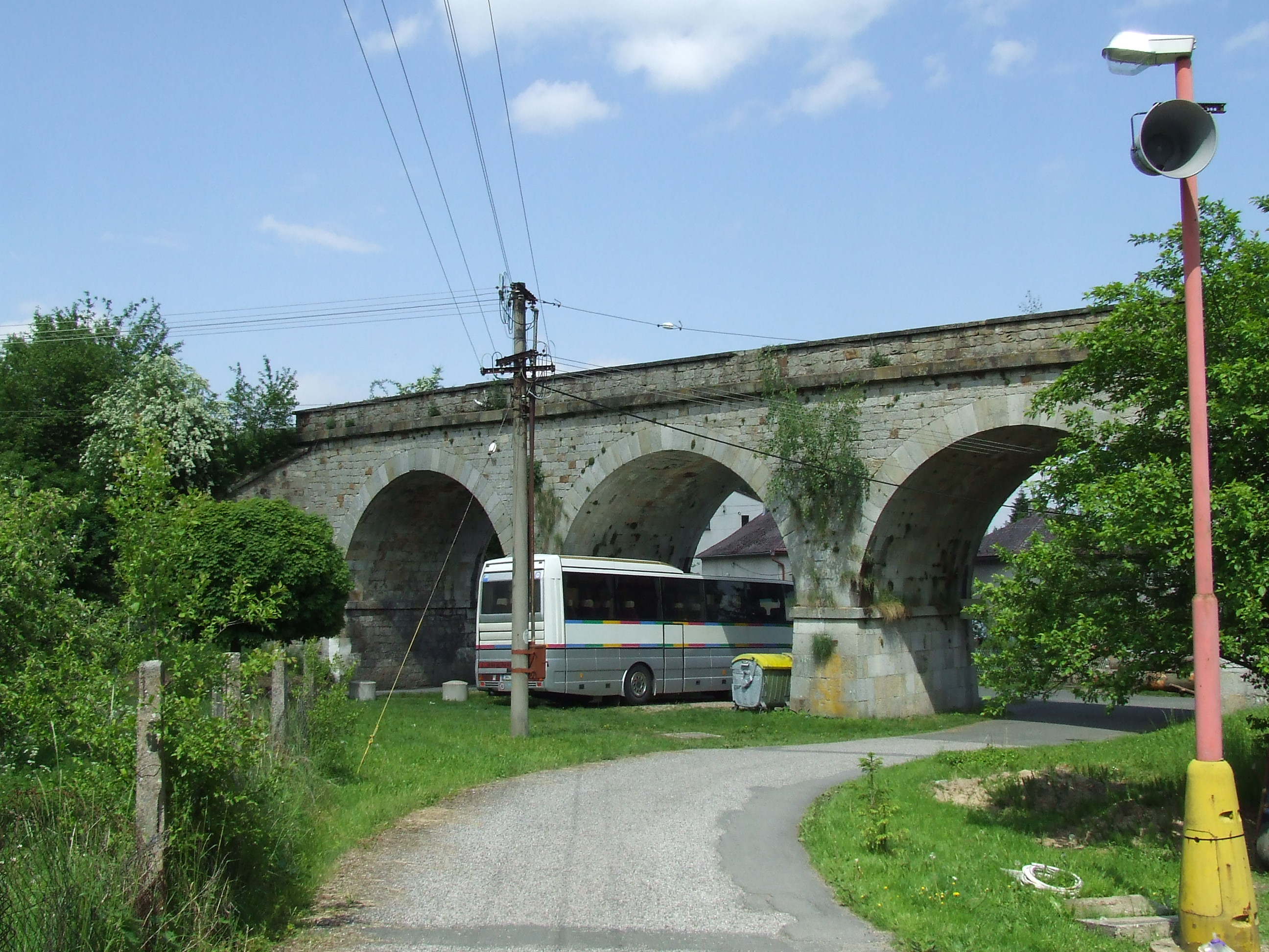 BíӀá Třemešná železniční most